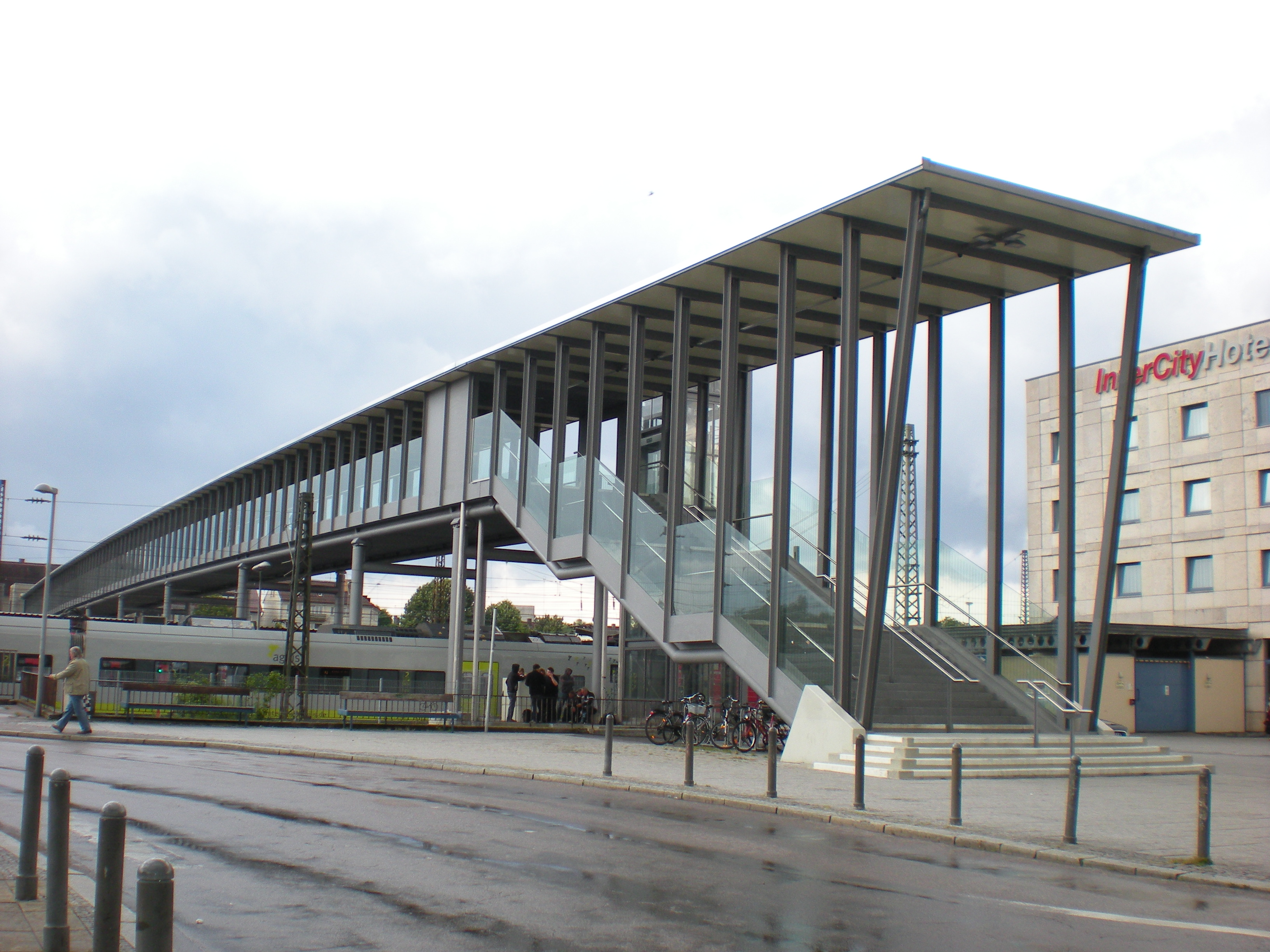 Neuer Bahnhofsteg von 2011 am Ulmer Hauptbahnhof